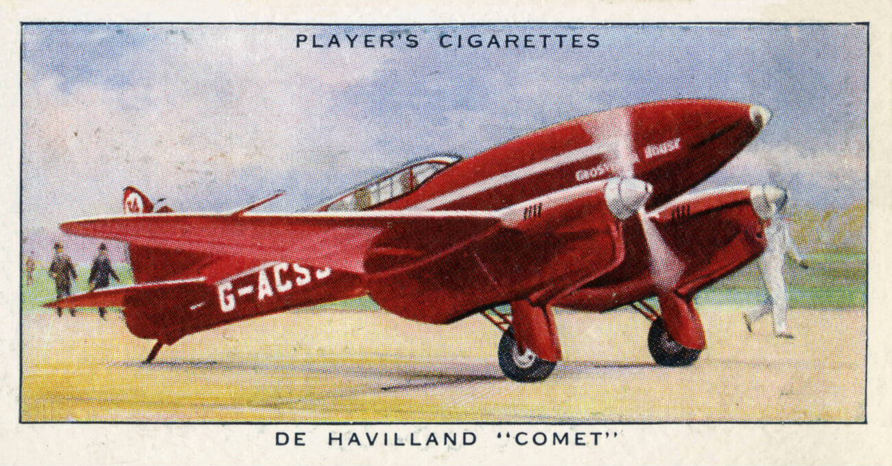 de Havilland DH.88 Comet racer G-ACSS Grosvenor House.